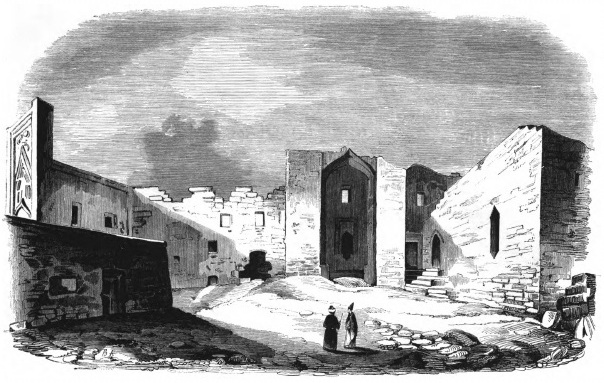 Вид бакинского дворца с северо-западной стороны